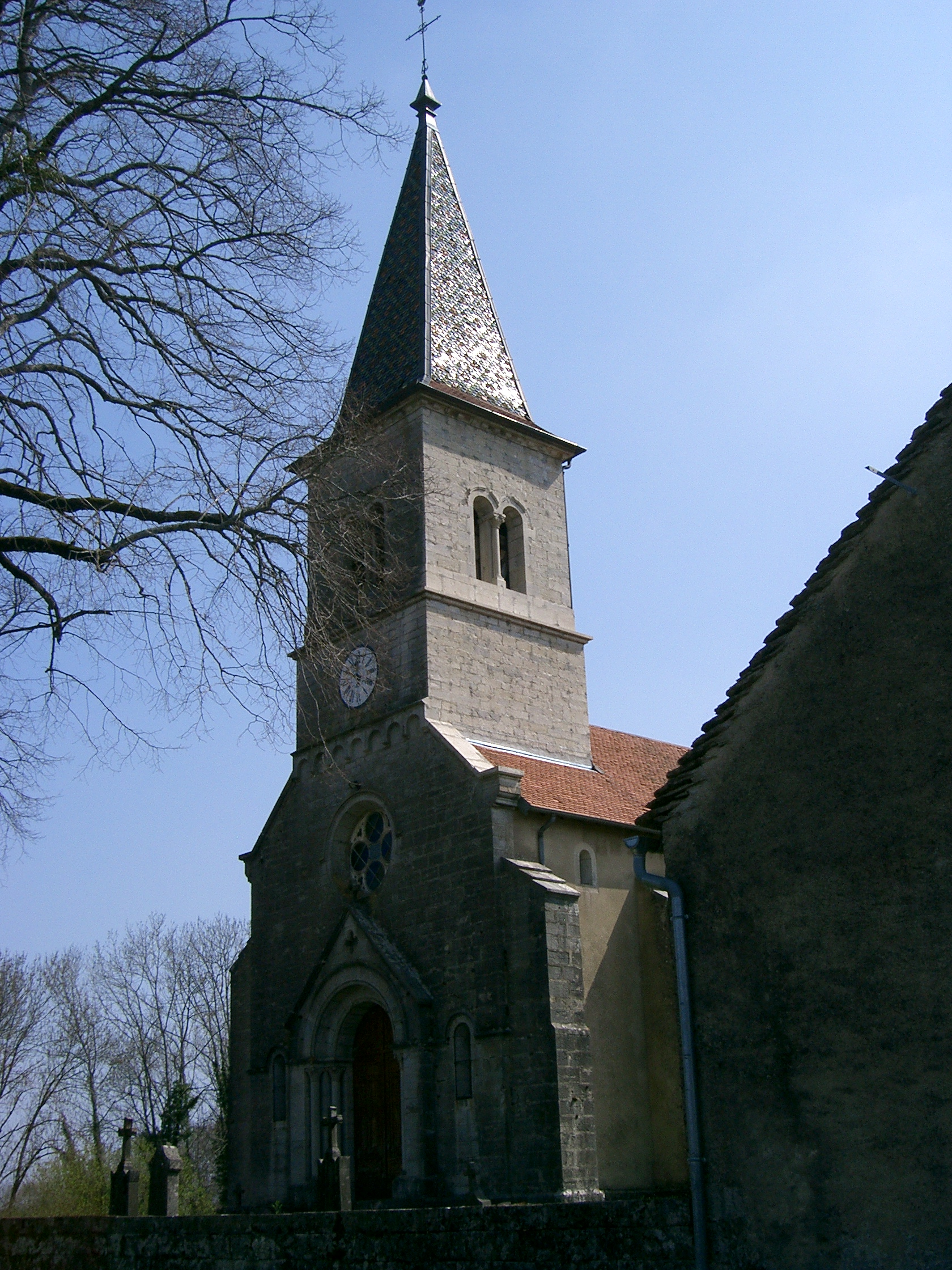 Fay-en-Montagne (39) - Église dédiée à saint Ferréol et saint Ferjeux, reconstruite vers 1860 et rénovée en 1970